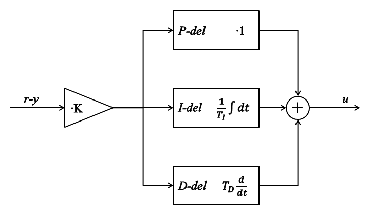 Blockschema av en PID-regulator